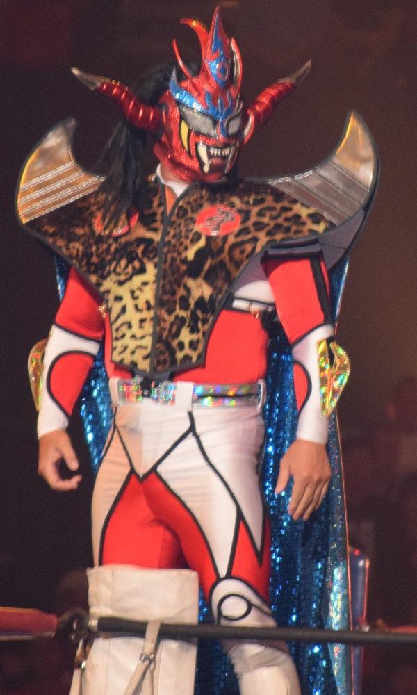 2015年11月7日 大阪府立体育会館 「POWER STRUGGLE」 獣神サンダー・ライガー